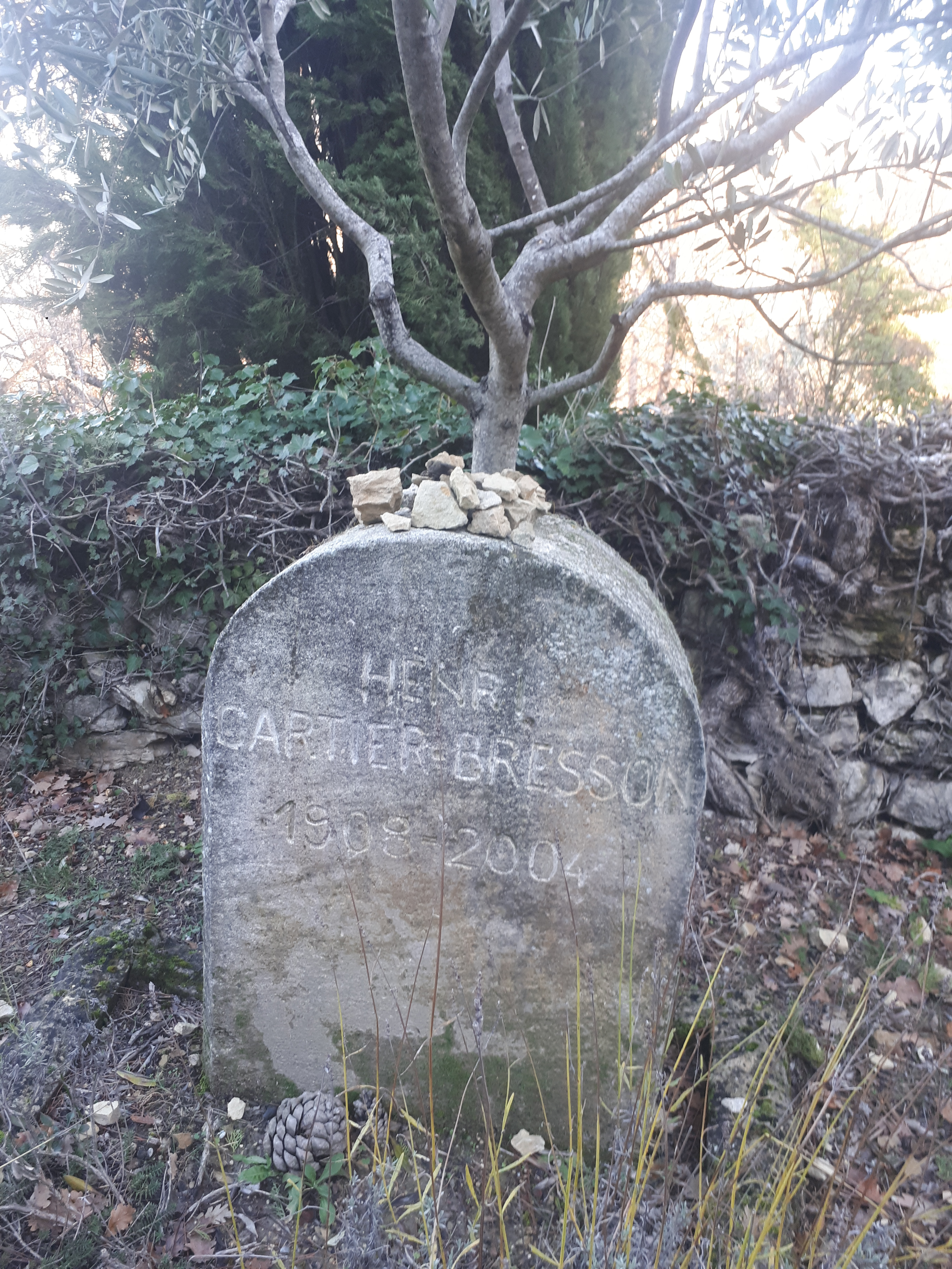 Tombe de Henri Cartier-Bresson, en FR MO9 Montjustin, France